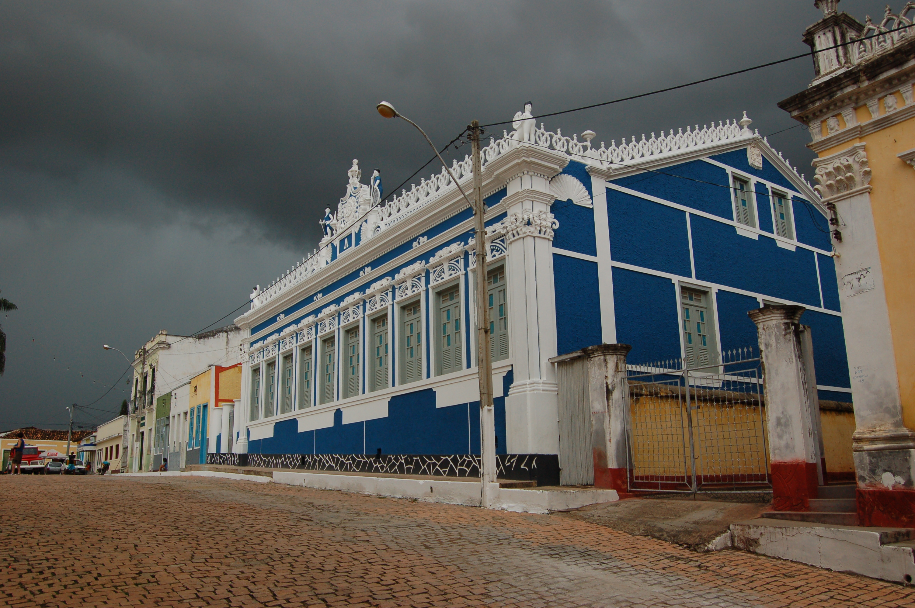 Palmeiras